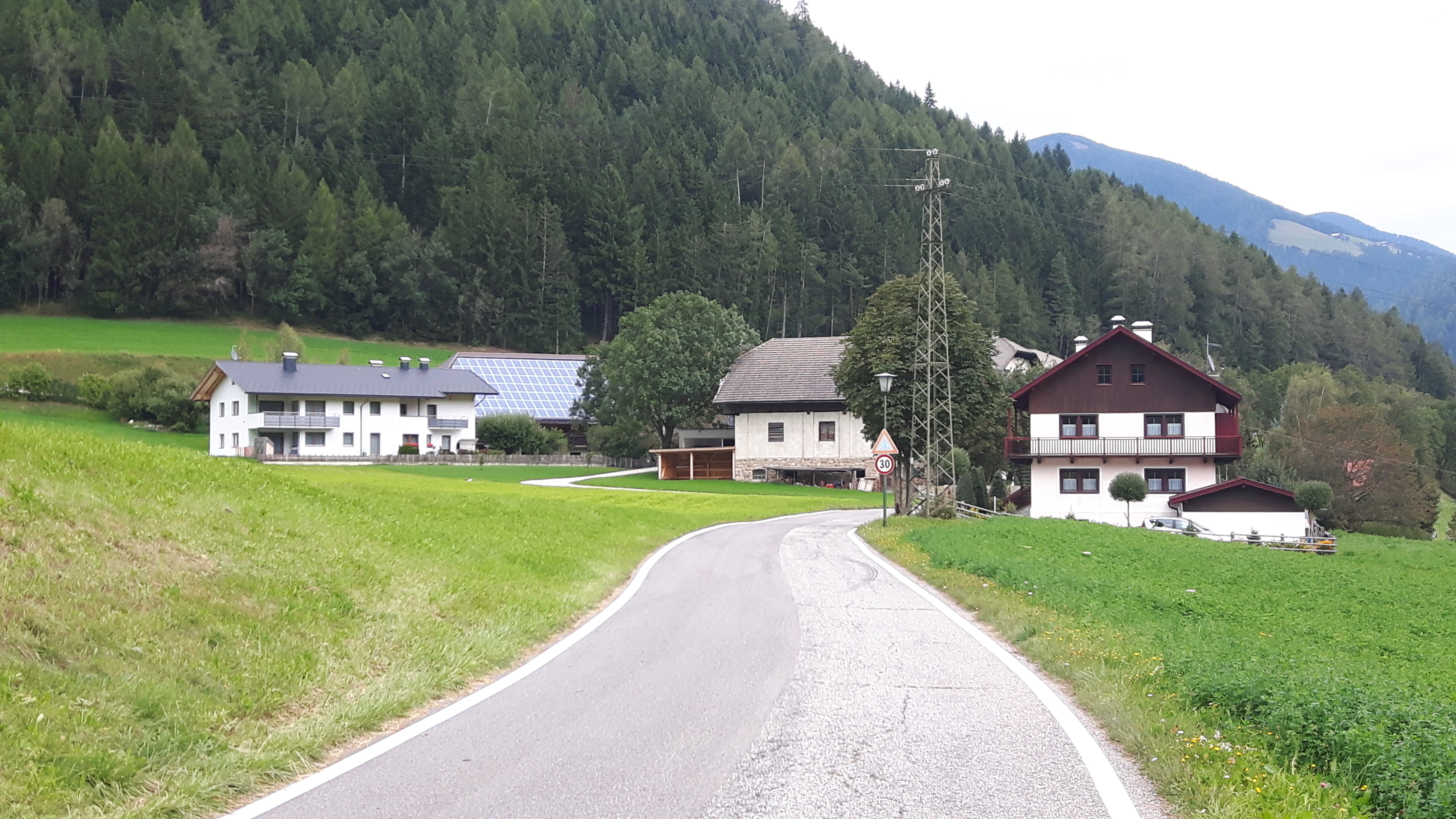 Neunhäusern in der Gemeinde Rasen-Antholz, Blick von Südwesten (2017)